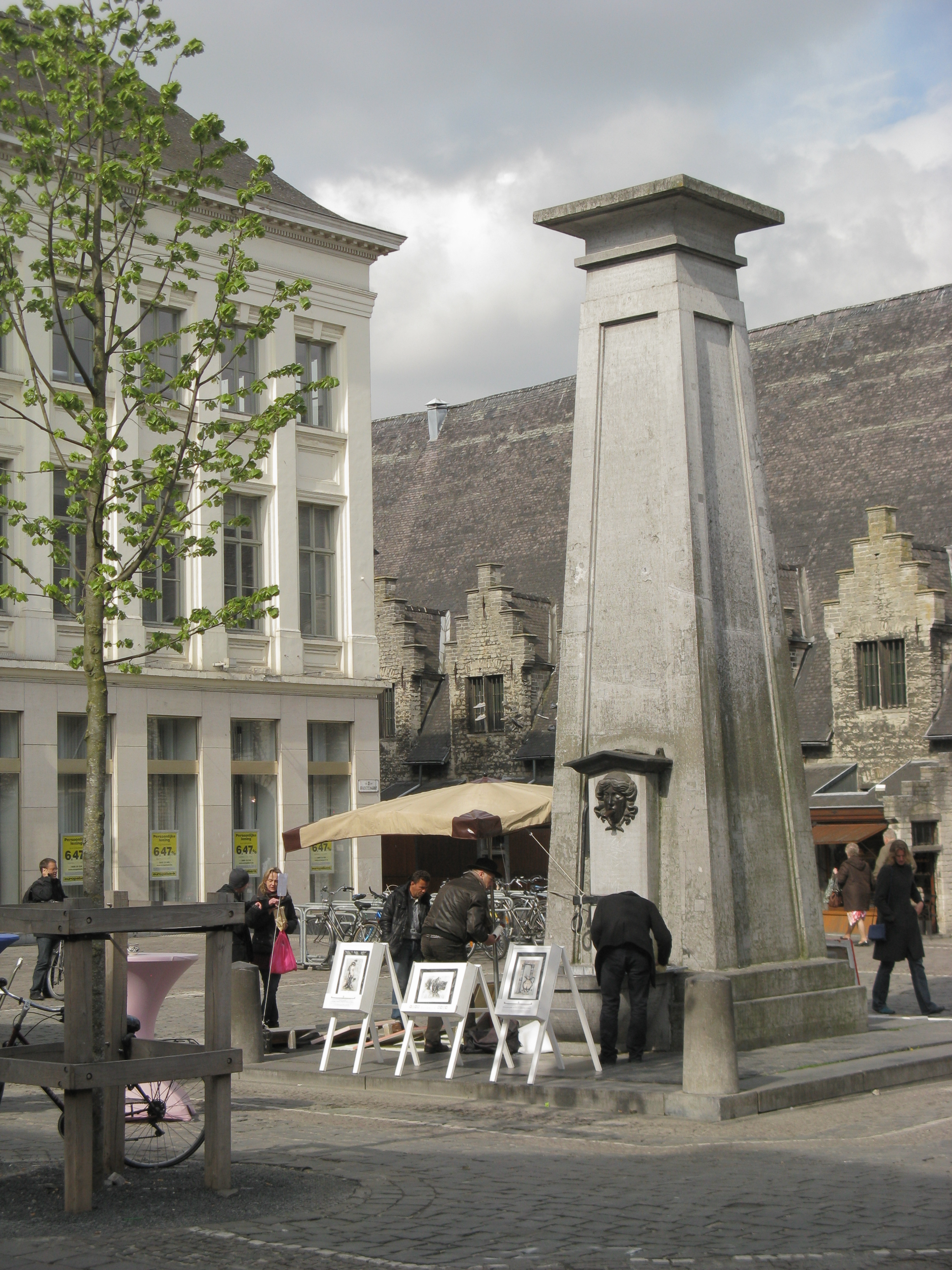 Groentenmarkt, Gent